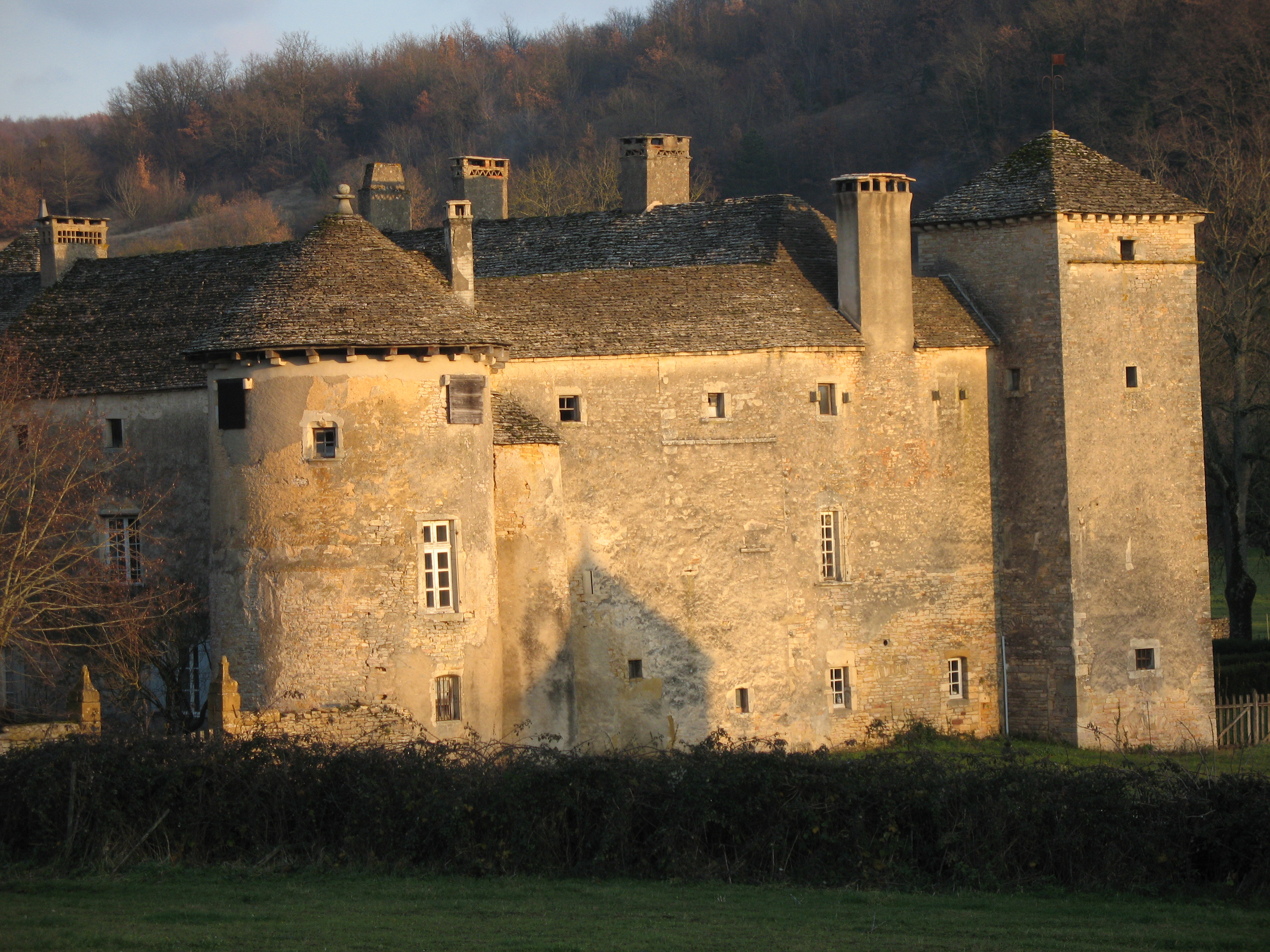 château d'Ozenay (Saône-et-Loire)